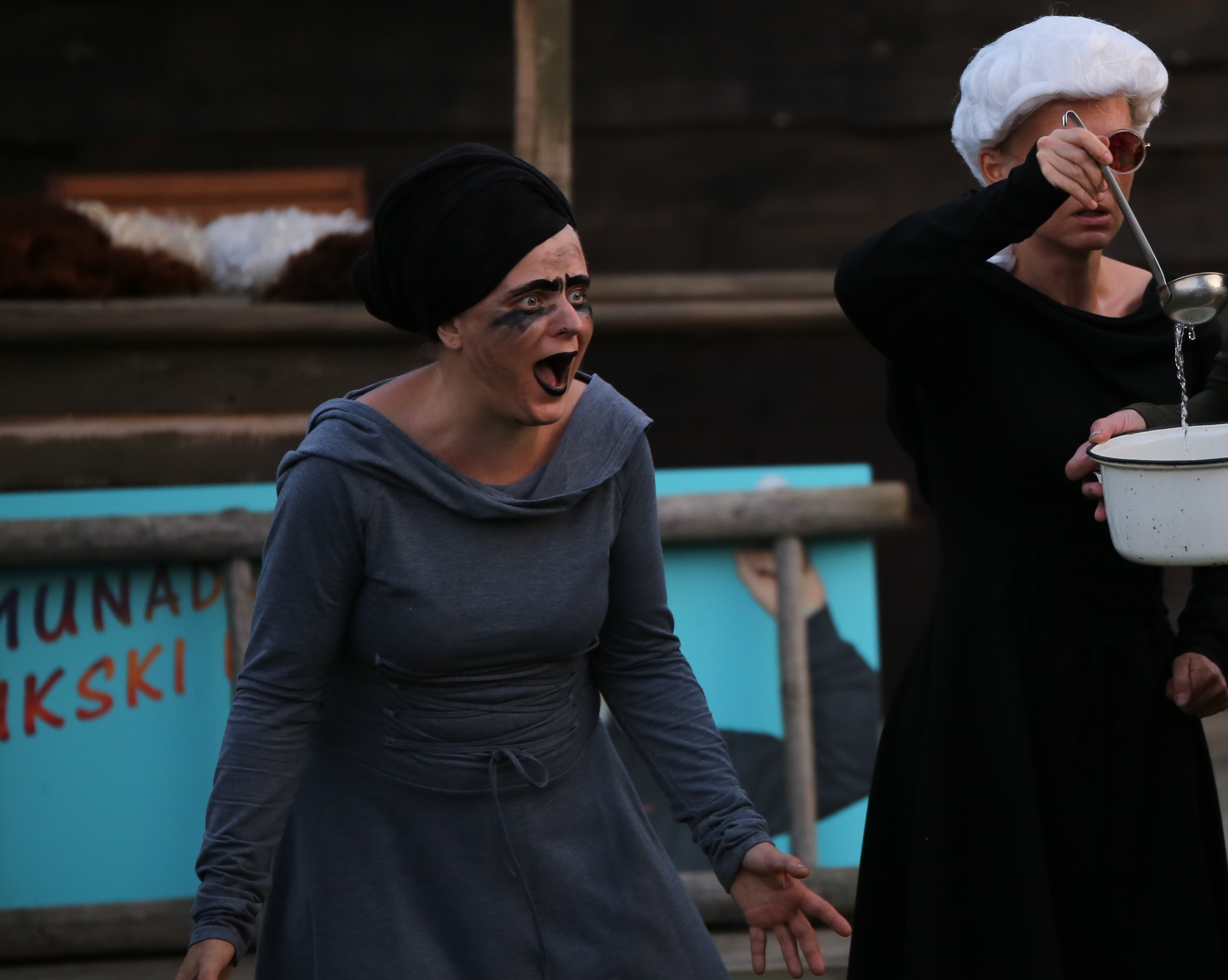 Ingrid Ulst suvelavastuses